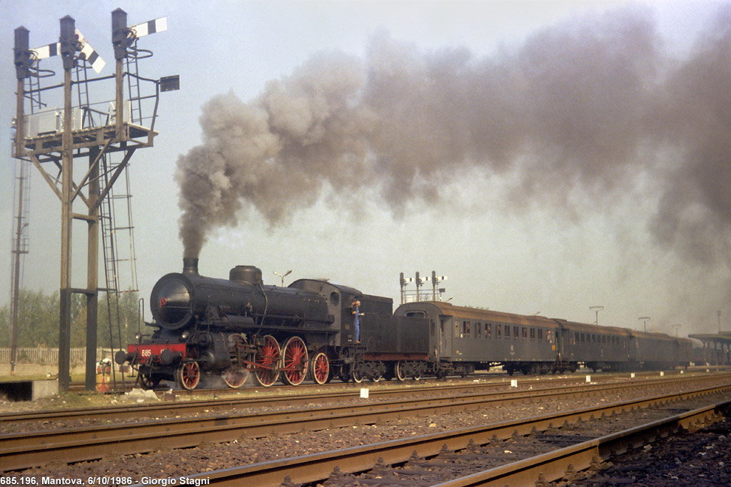 Un treno speciale trainato dalla locomotiva a vapore 685.196 in arrivo a Mantova. Notare il segnale ad ali a candeliere.